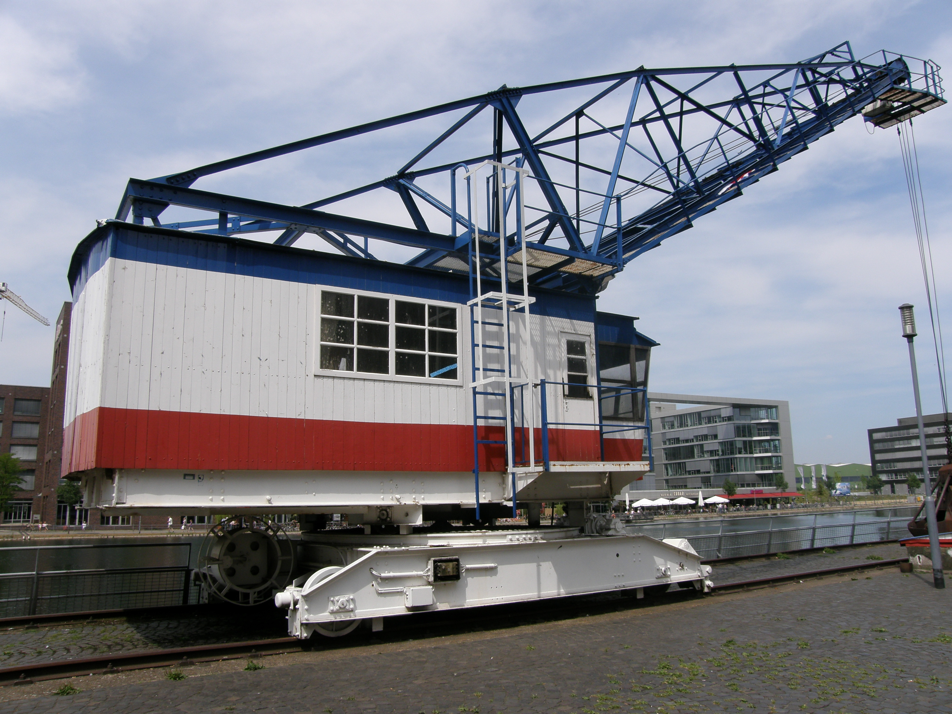 Innenhafen Duisburg Ehemaliger Hafenkran vor dem Hafenforum